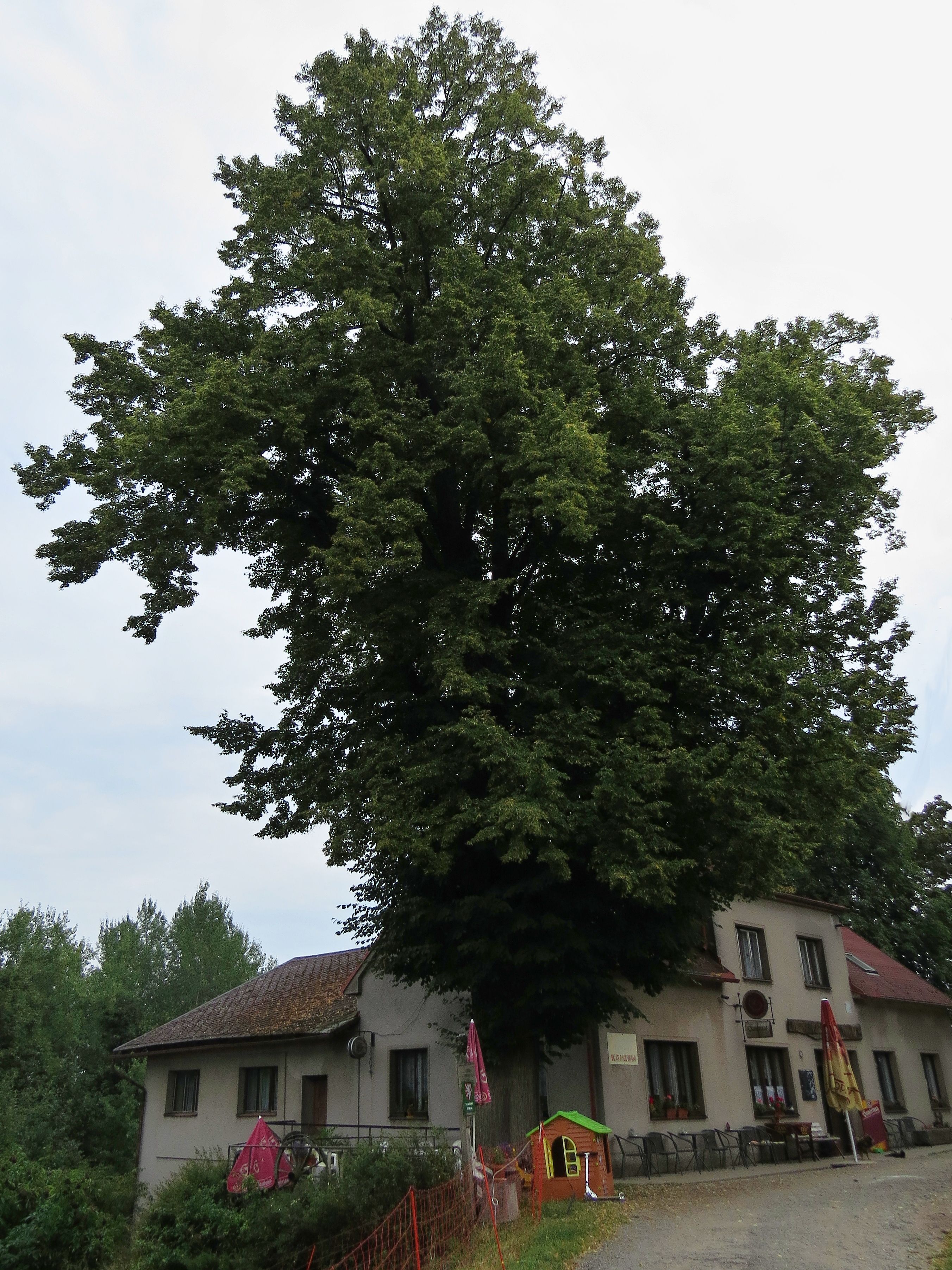 Památný strom Obecní lípa ve vesnici Chlívce (část obce Stárkov)